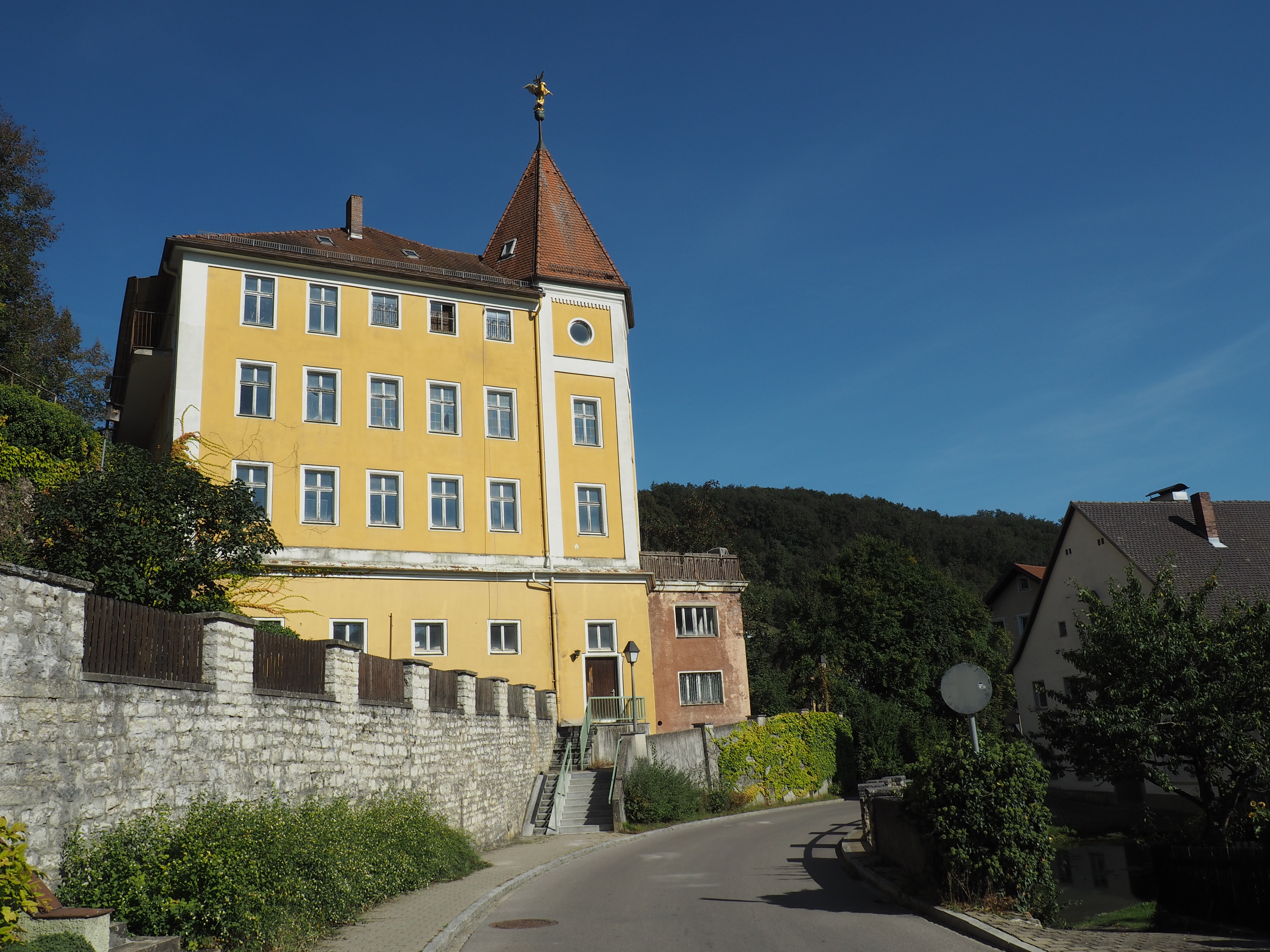 Massiv erscheinender zweigeschossiger Bau mit Krüppelwalmdach, 18./19. JahrhundertThis is a photograph of an architectural monument.